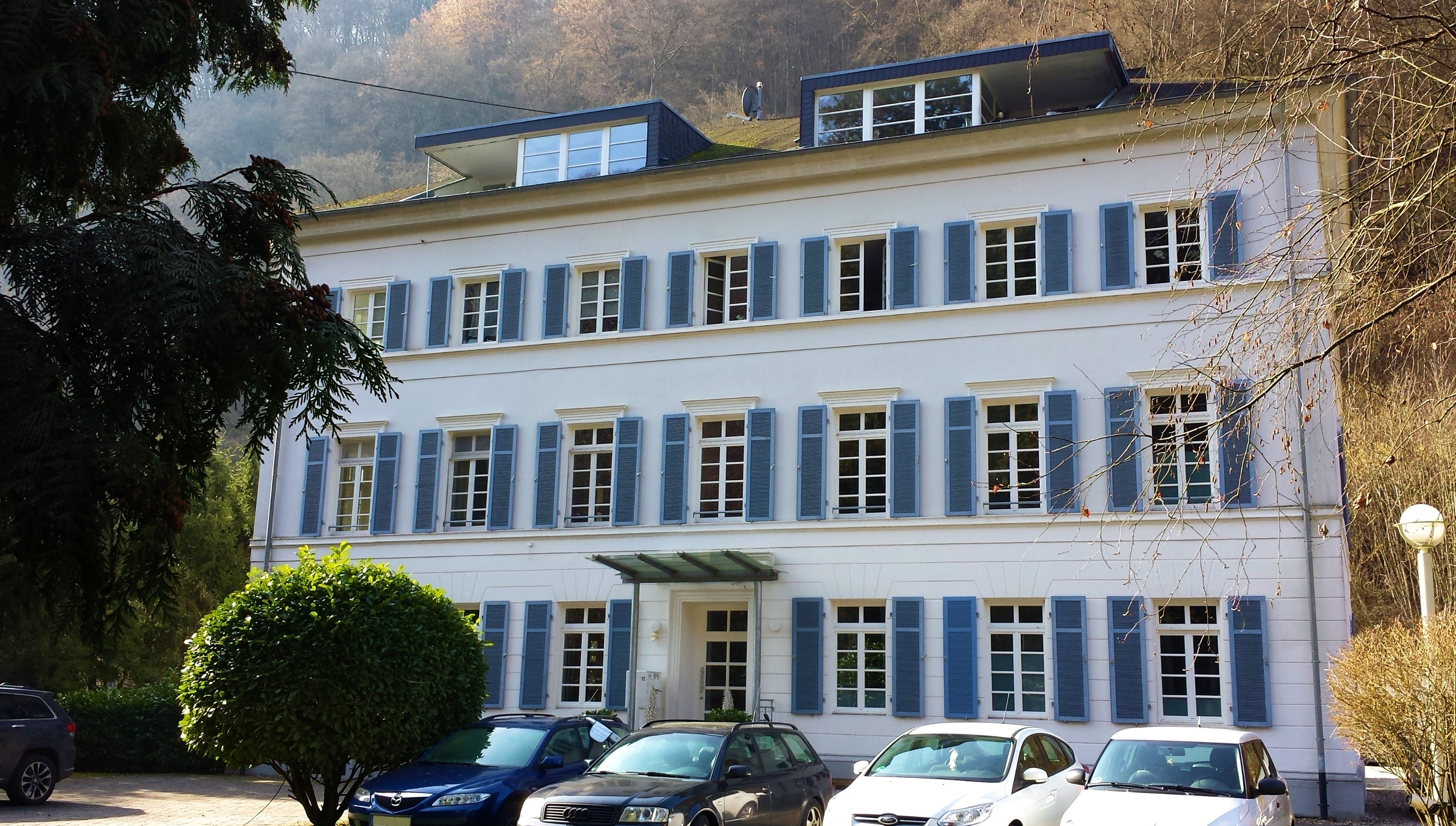 Ehemaliges Wohnhaus der Famlie Remy